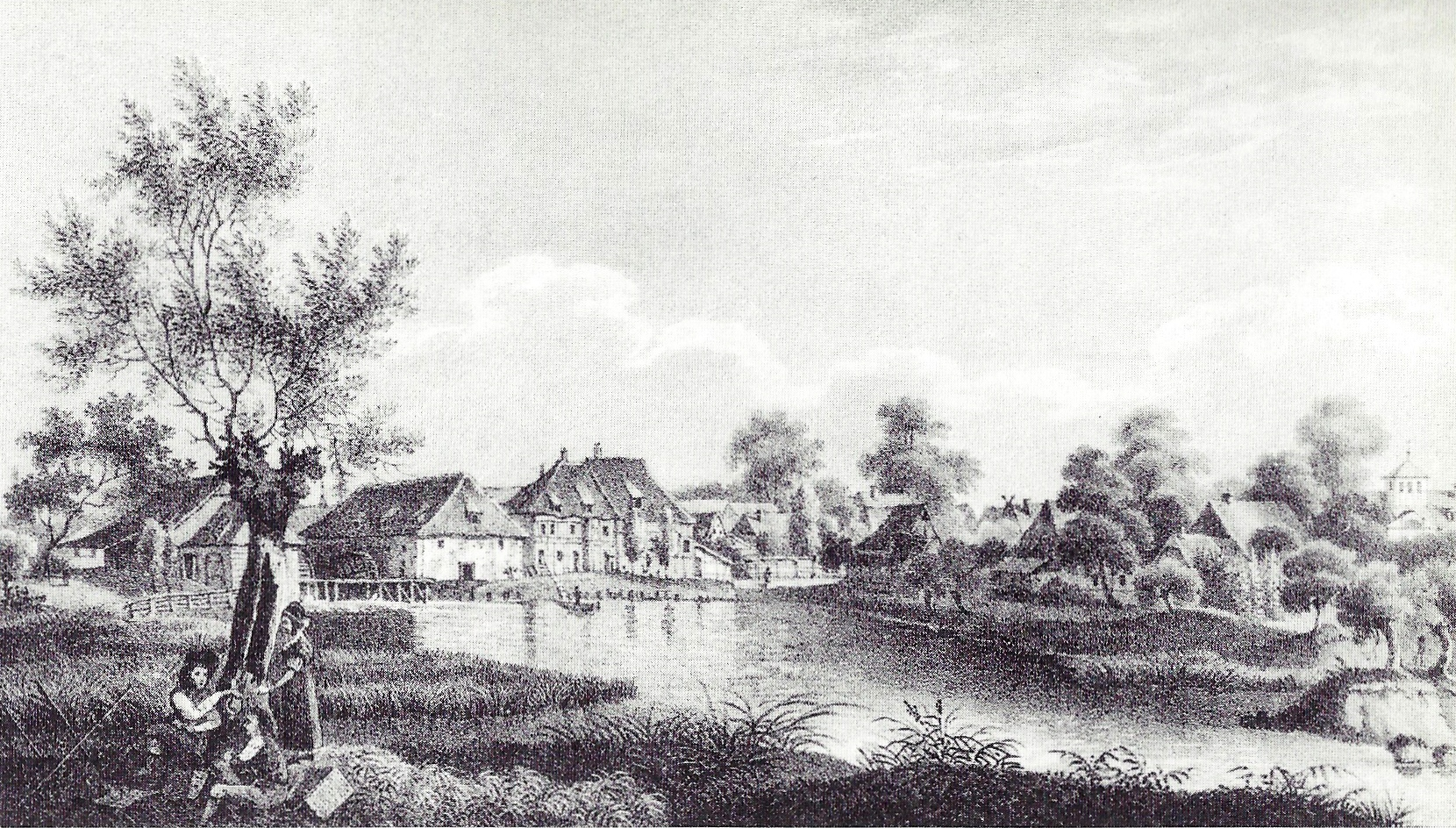 "Die Mühle zu Ölper 1830, Lithographie von Lütke", veröffentlicht in den "Erinnerungen an Braunschweig", Nr. 2, erschienen im Verlag Schenksche Kunstbuchhandlung in Braunschweig. Das gleiche Bild ist als "Mühle zu Ölper von Südwesten" mit unbekanntem Urheber in der Sammlung des Städtischen Museums Braunschweig "Das Bild der Stadt in 900 Jahren, Band II, Braunschweigs Stadtbild", 1985, aufgeführt. Vermutlich ist diese Ansicht jedoch ausNordosten, da deutlich das Wohnhaus und rechts im Bild der Ölper Turm erkennbar sind.